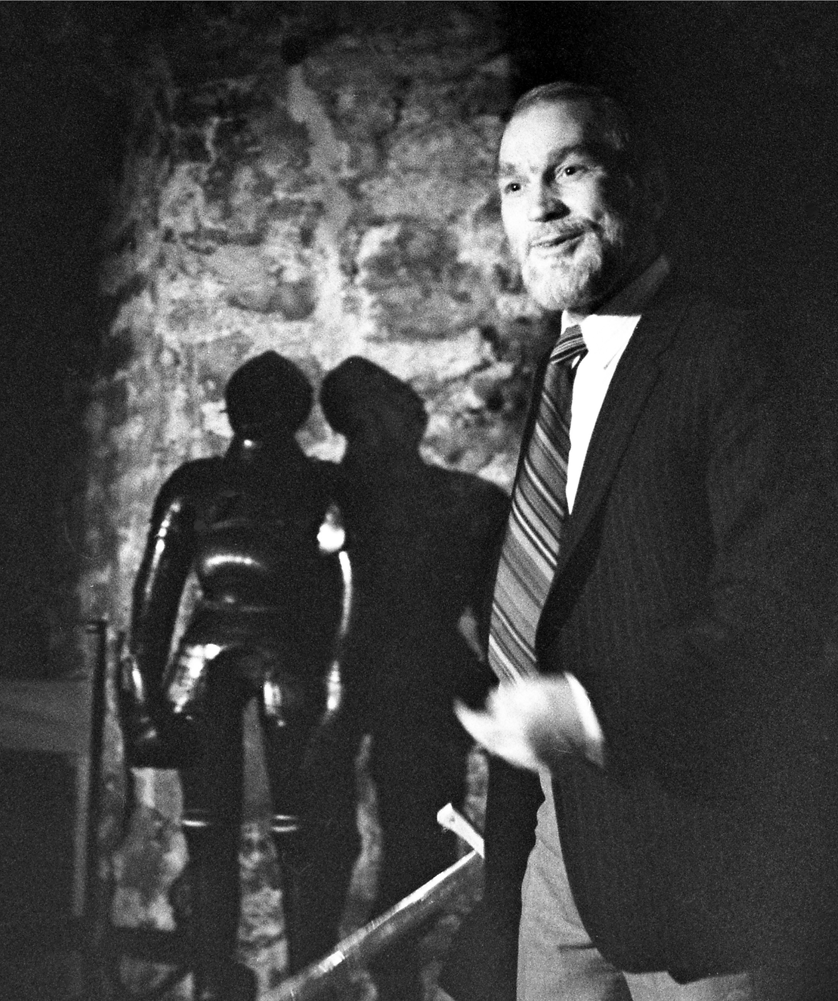 Mikk Mikiver Kiek in de Kökis. 83